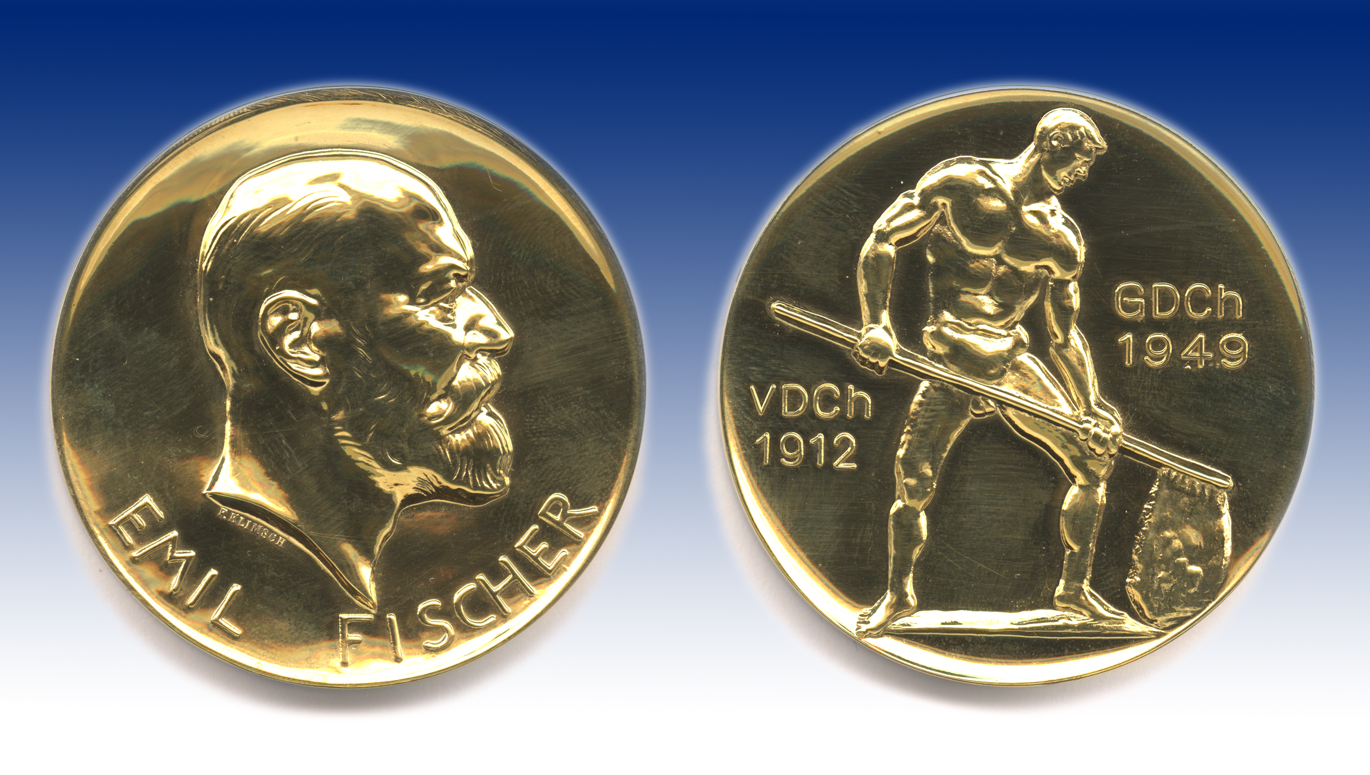 Abbildung der Medaille (Vor- und Rückseite)